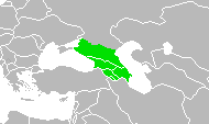 Caucasus locator map.